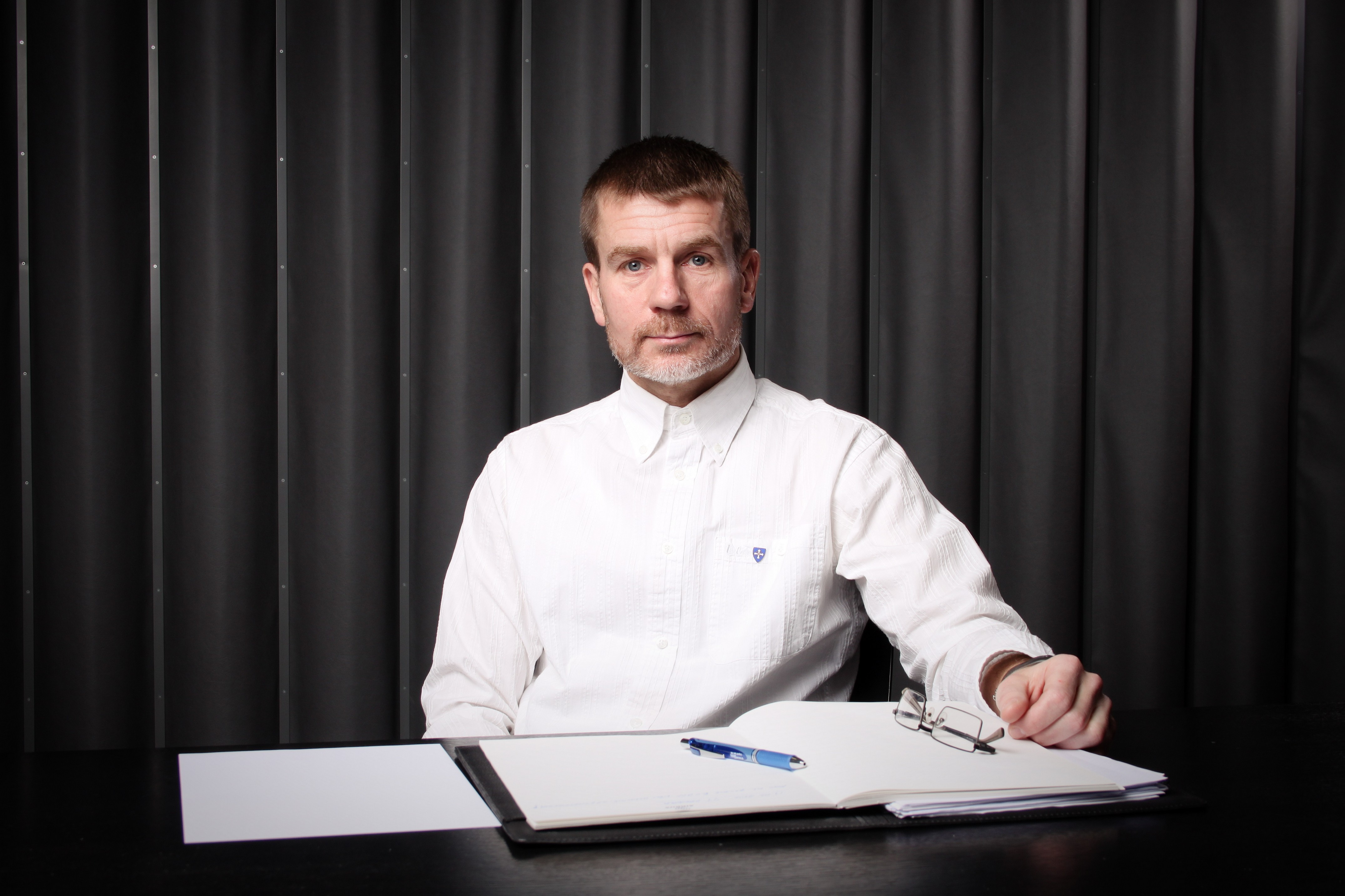 Avo Tölpt portree